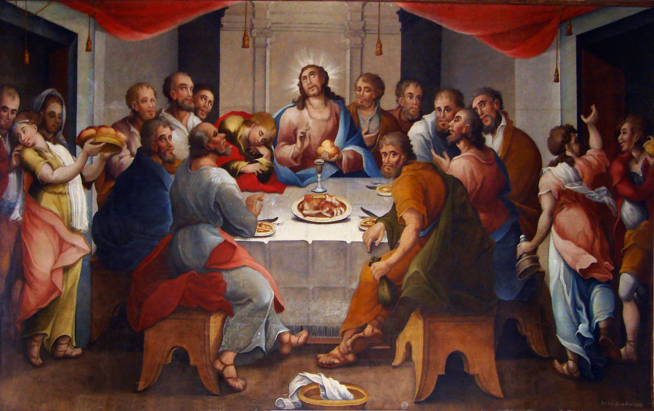 Santa Ceia 1828, única obra de cavalete de Mestre Ataíde. Colégio do Caraça, Minas Gerais, Brasil.